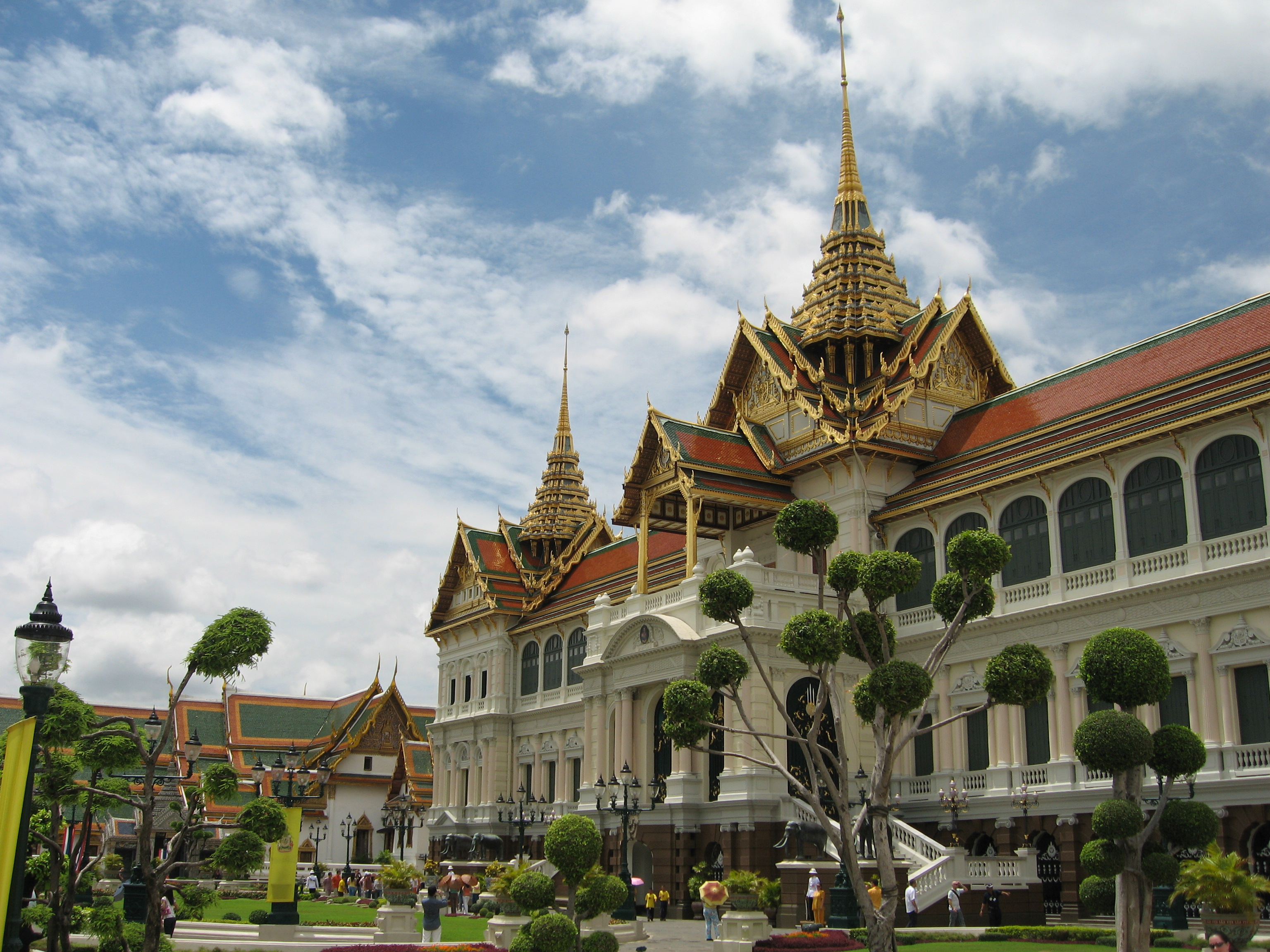 Grand Palace / Chakri Mahaprasad, Bangkok